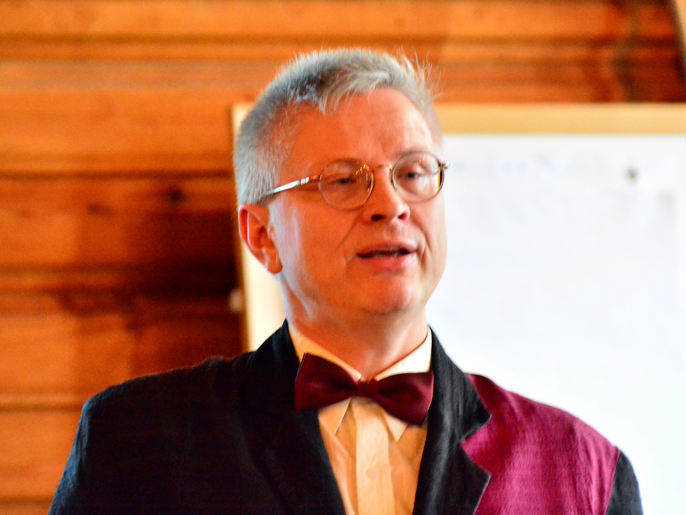 Olle Bälter